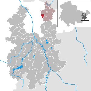 Schwaara in Thuringia - District Greiz